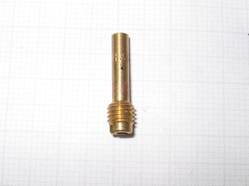 Emulsionatore per carburatori motociclistici a ghigliottina